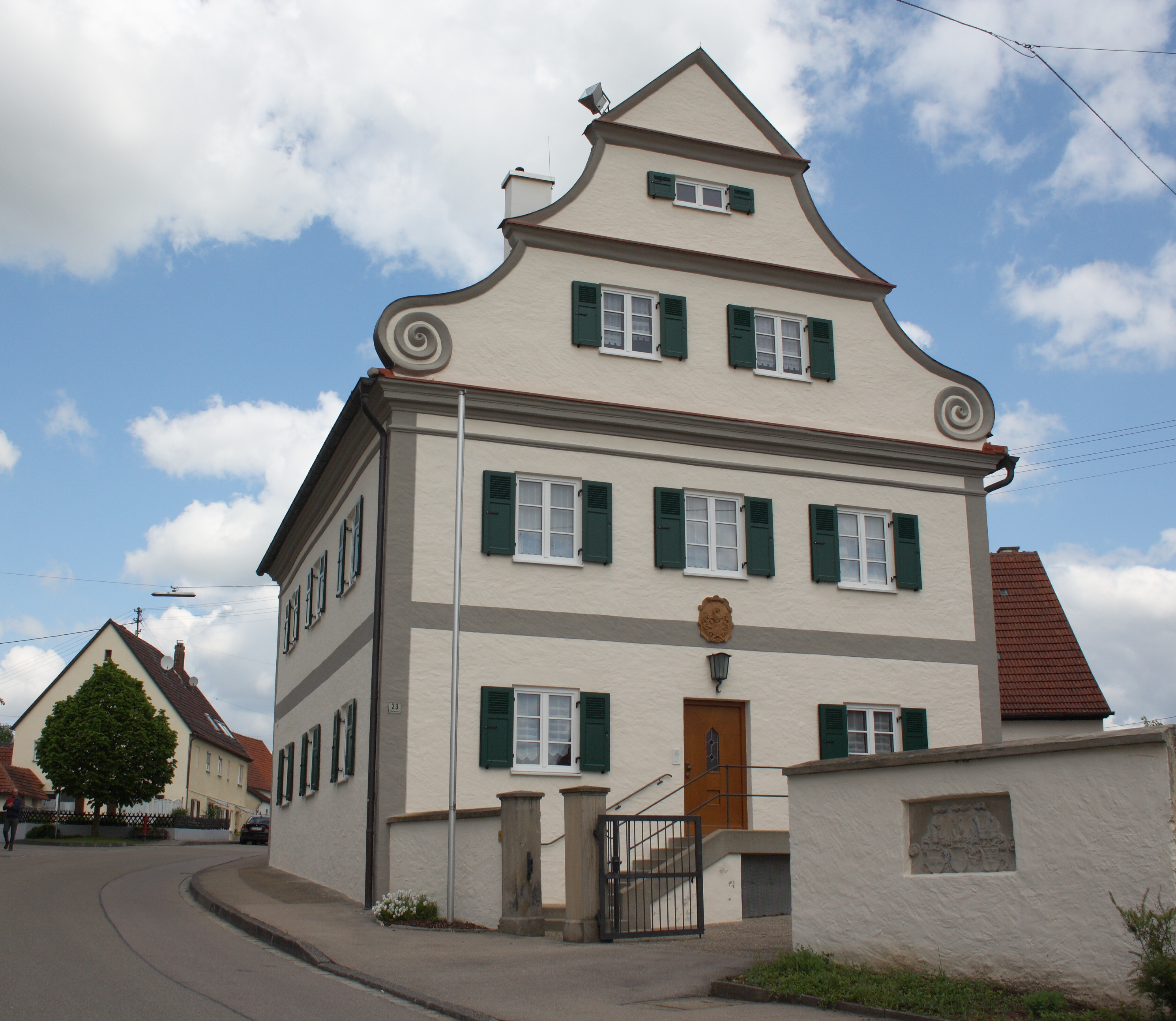 ehemaliges katholisches Pfarrhaus in Bissingen im Landkreis Dillingen an der Donau (Bayern), 1684 erbaut von Georg Danner